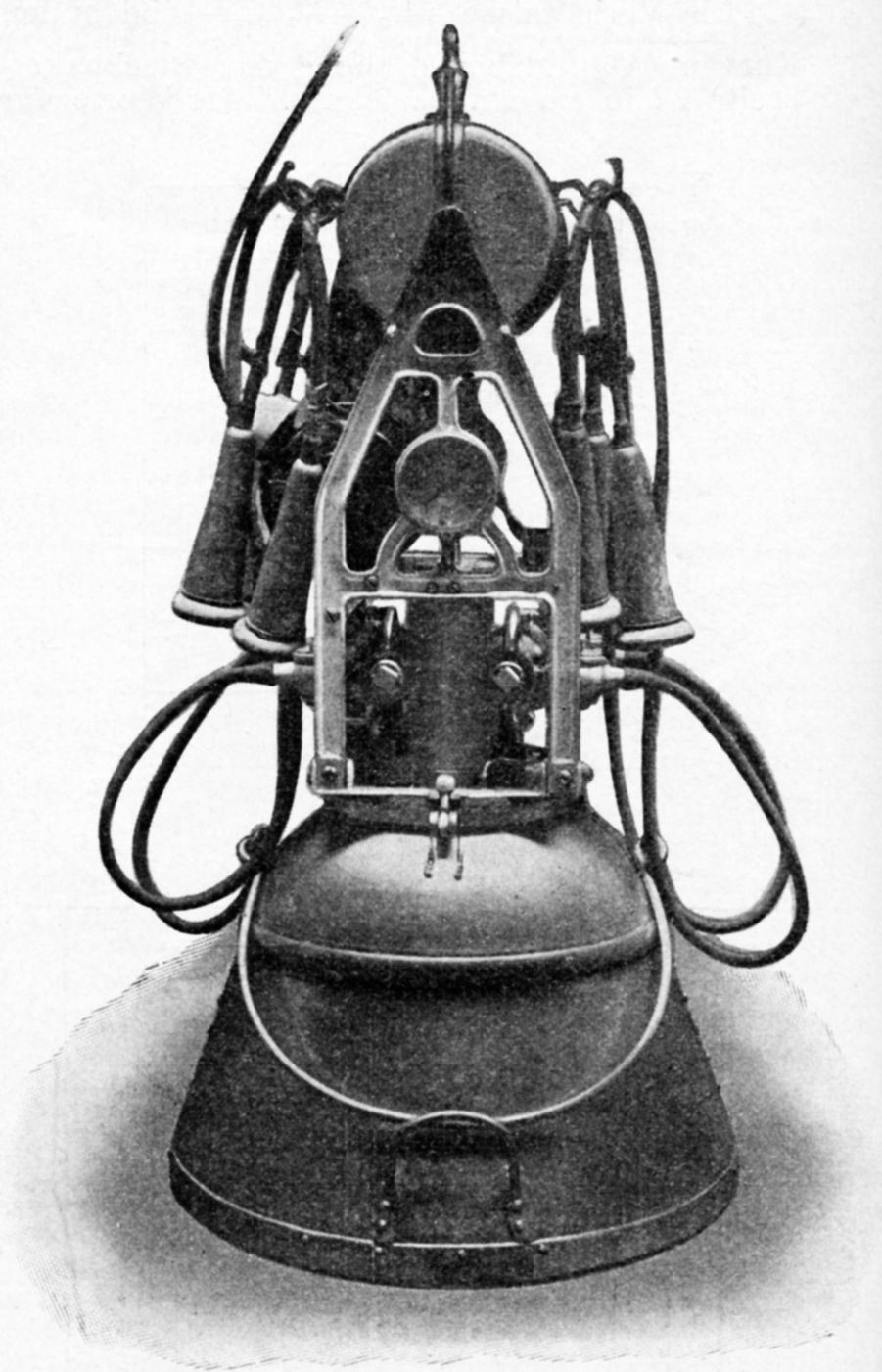 elektrischer Melkapparat